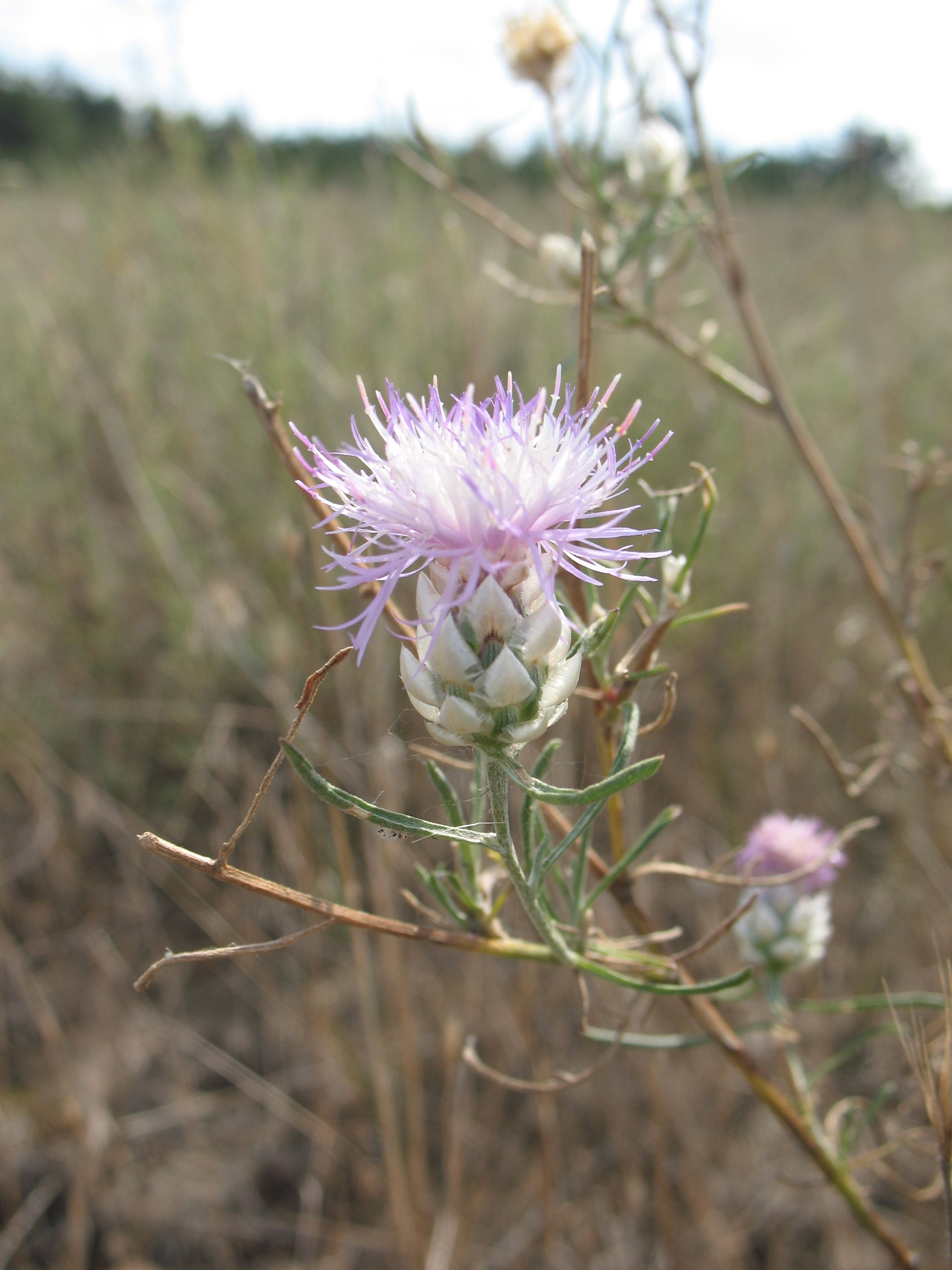 Андріївське, Миколаївський р-н